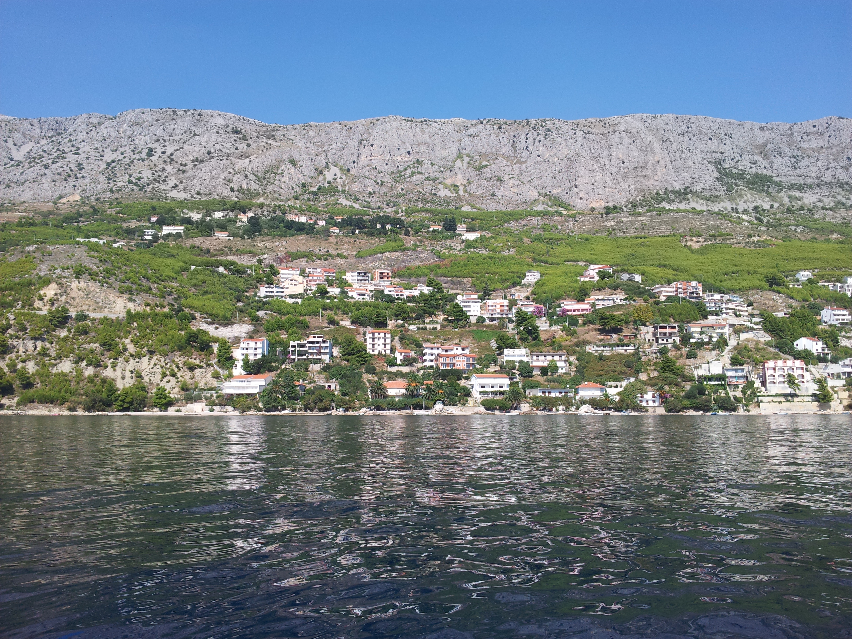 Čelina, Zavode